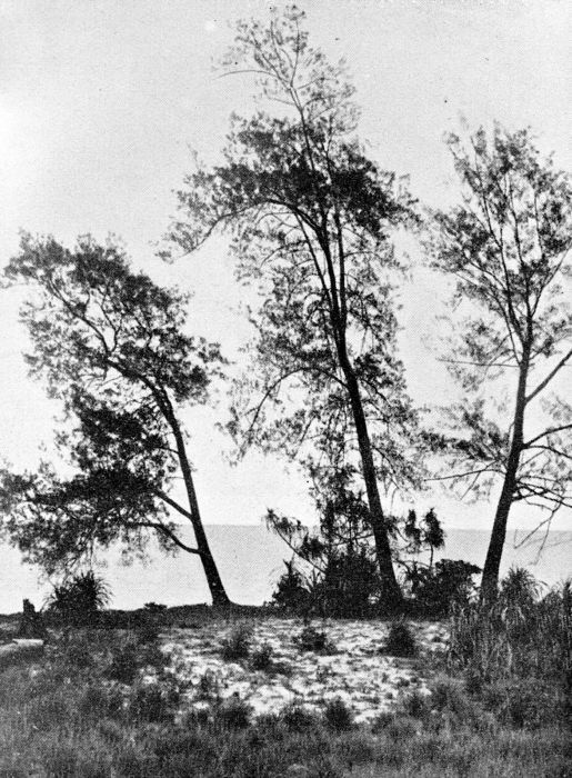 Repronegatief. Strandwal met casuarina equisetifolia Forst en Pandanus tectorius sol